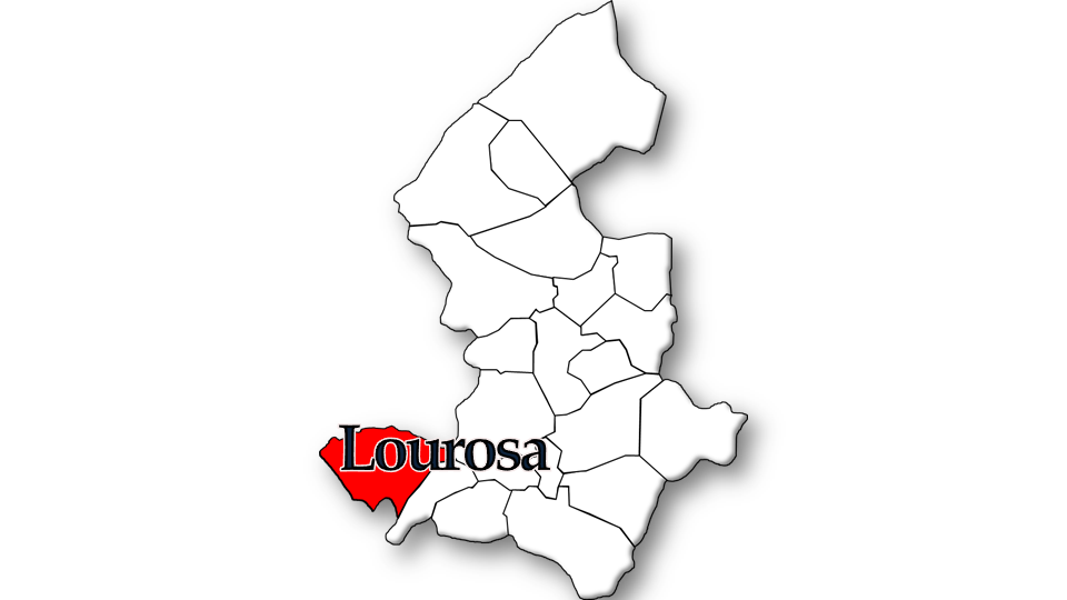 População